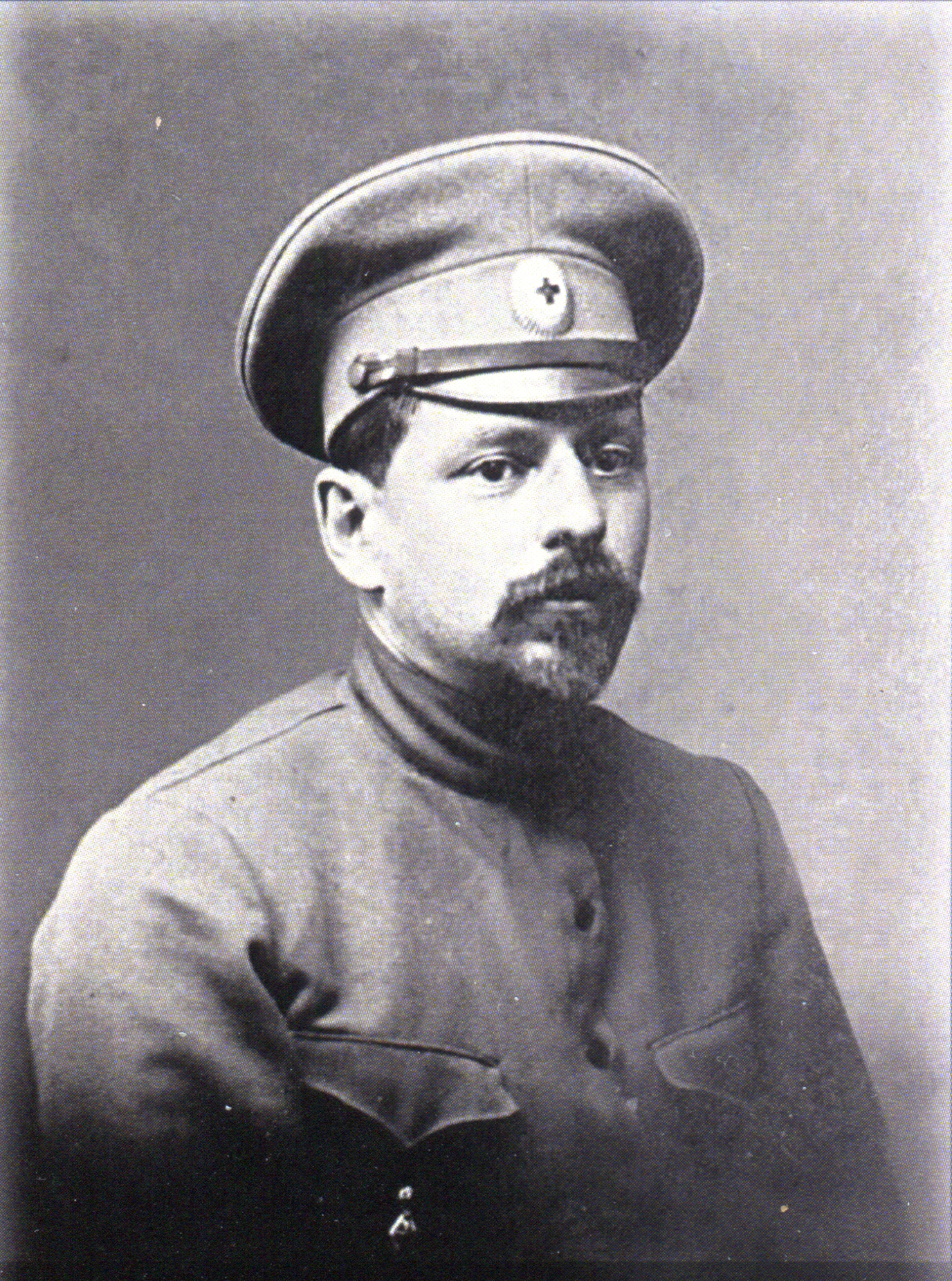 Георгий Юлианович Дениcман, отец эколога Льва Георгиевича Динесмана (10 ноября 1919—2005), зоолога, доктора биологических наук, пионера использования радиокарбонового метода в экологических исследованиях в СССР.